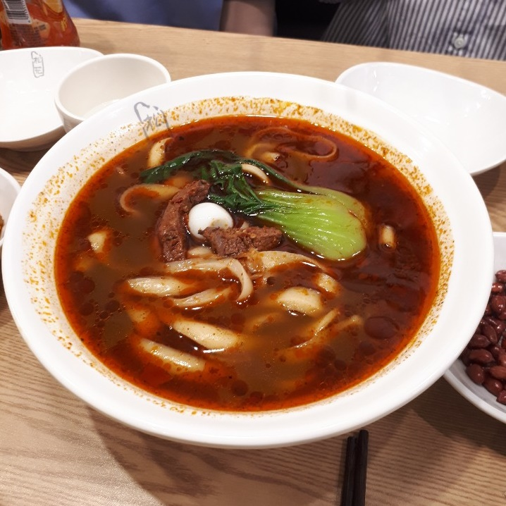 도삭면 사진